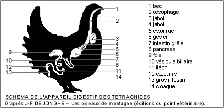 Appareil digestif des Tétraonidés